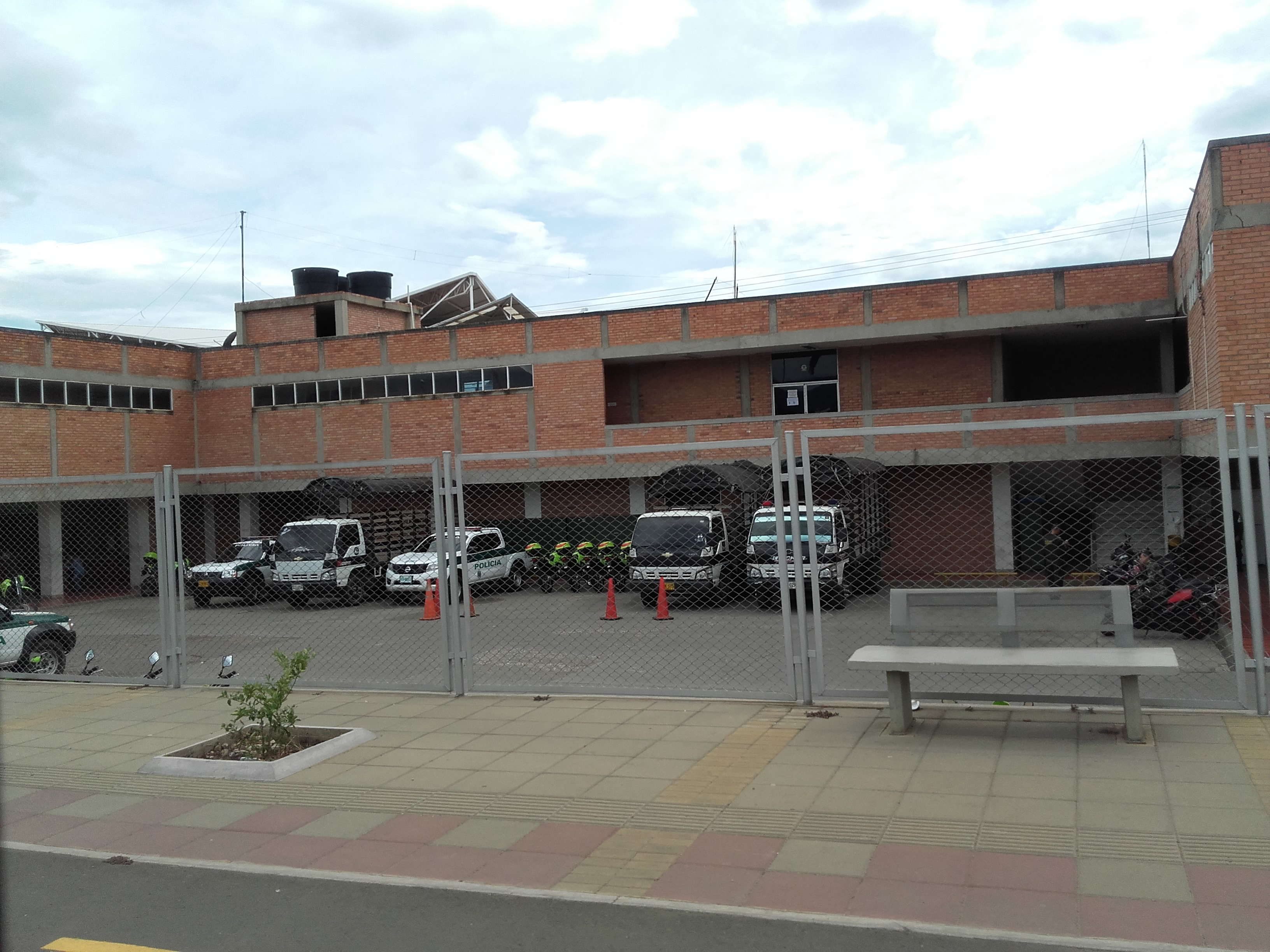 polisss